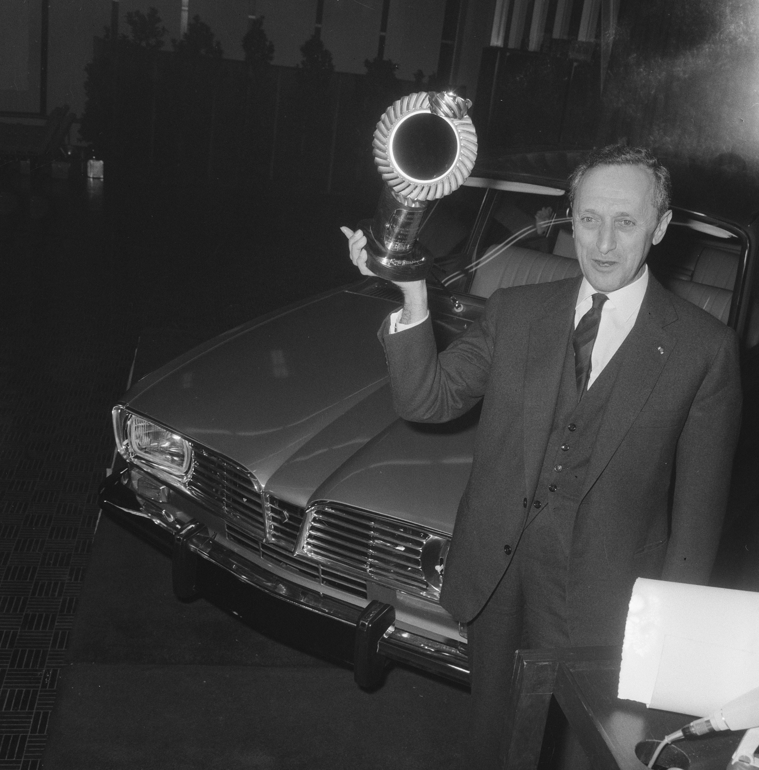 Collectie / Archief : Fotocollectie Anefo Reportage / Serie : [ onbekend ] Beschrijving : Trophee Auto van het jaar uitgereikt aan President-Directeur-Generaal van Renault-fabrieken, Pierre Dreyfus Datum : 3 februari 1966 Trefwoorden : trofeeen Fotograaf : Nijs, Jac. de / Anefo Auteursrechthebbende : Nationaal Archief Materiaalsoort : Negatief (zwart/wit) Nummer archiefinventaris : bekijk toegang 2.24.01.03 Bestanddeelnummer : 918-7477